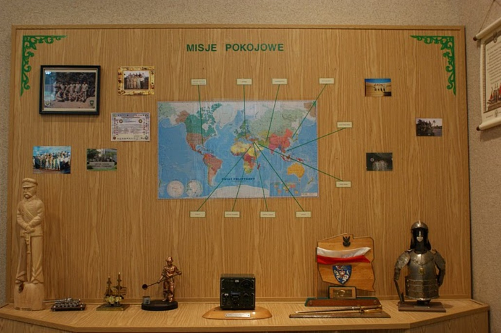 Garnizon Przasnysz, sala tradycji JW 4420, JW 5966